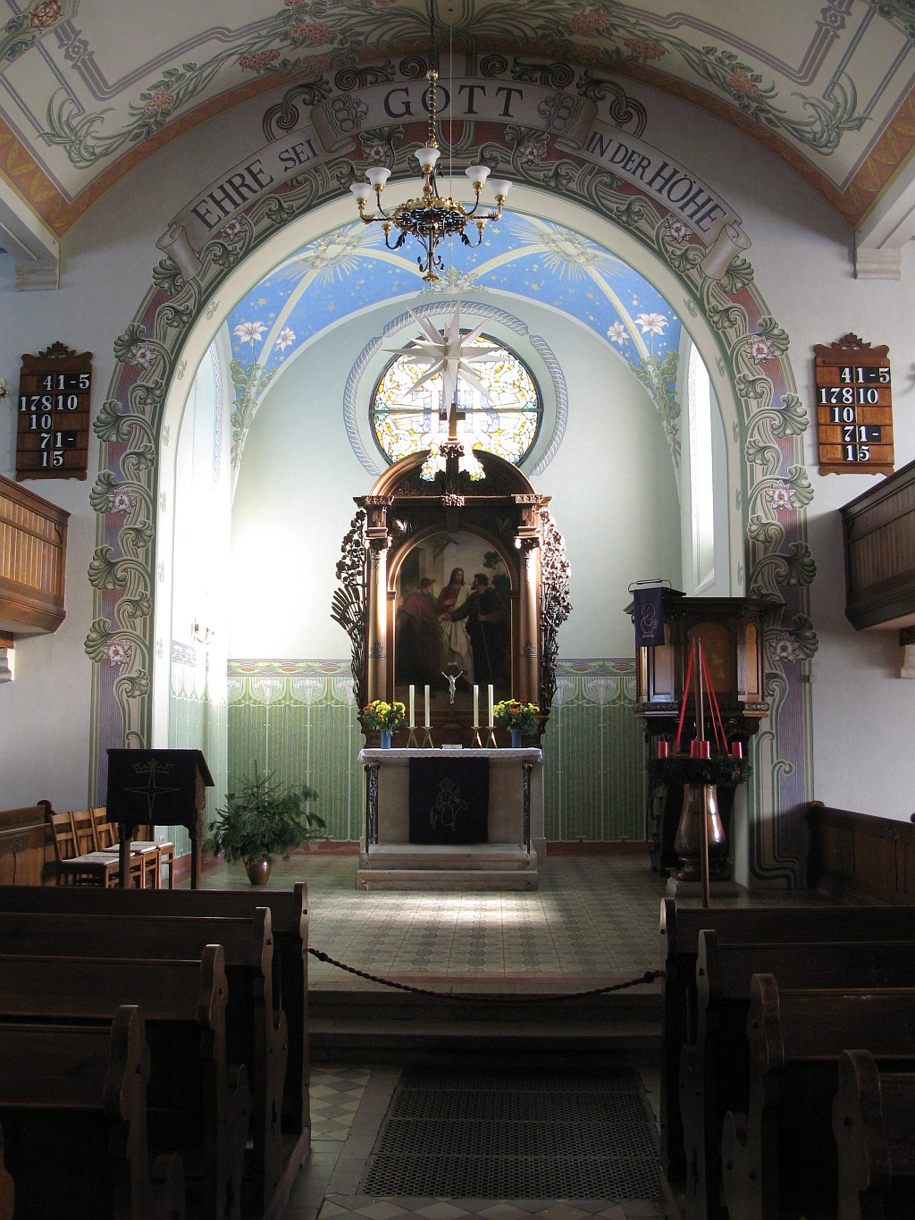 Kreuzkirche Dresden-Weißig, Innenansicht des Chores